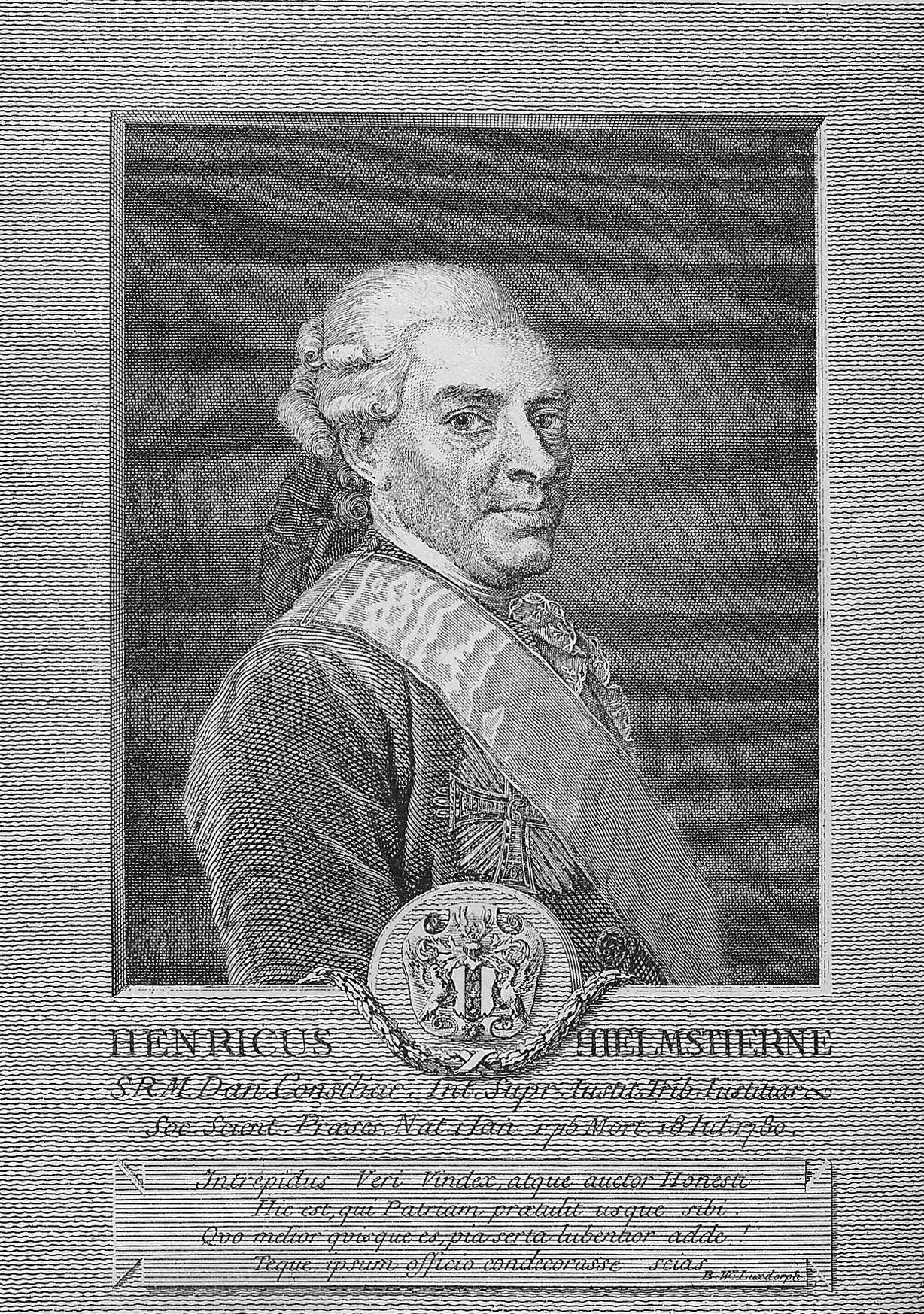 Henrik Hielmstjerne